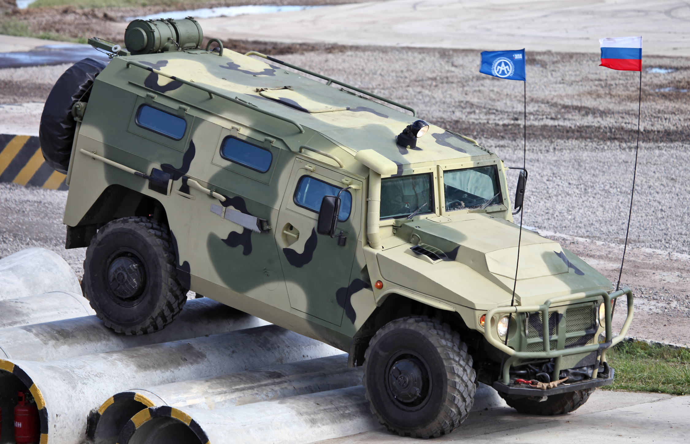 Бронеавтомобиль ВПК-233114 Тигр-М (VPK-233114 Tigr-M armoured vehicle)